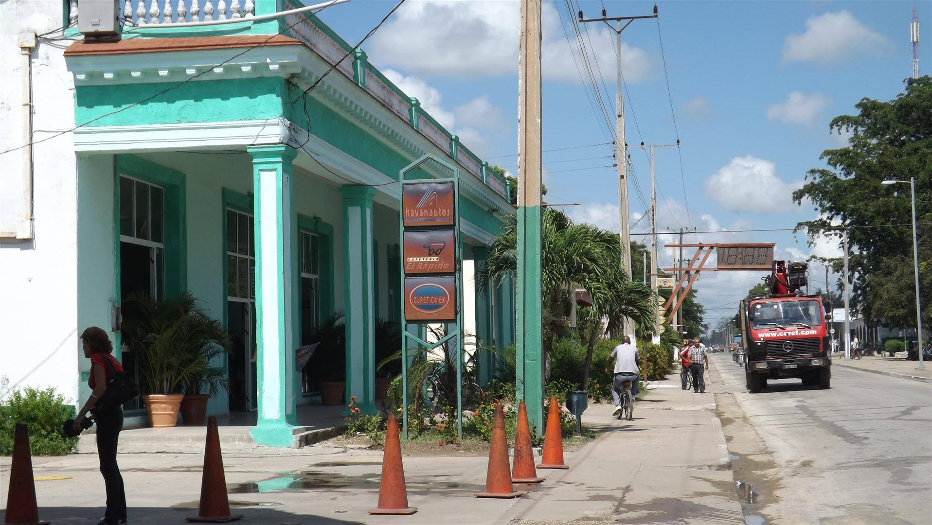 Florida, Cuba